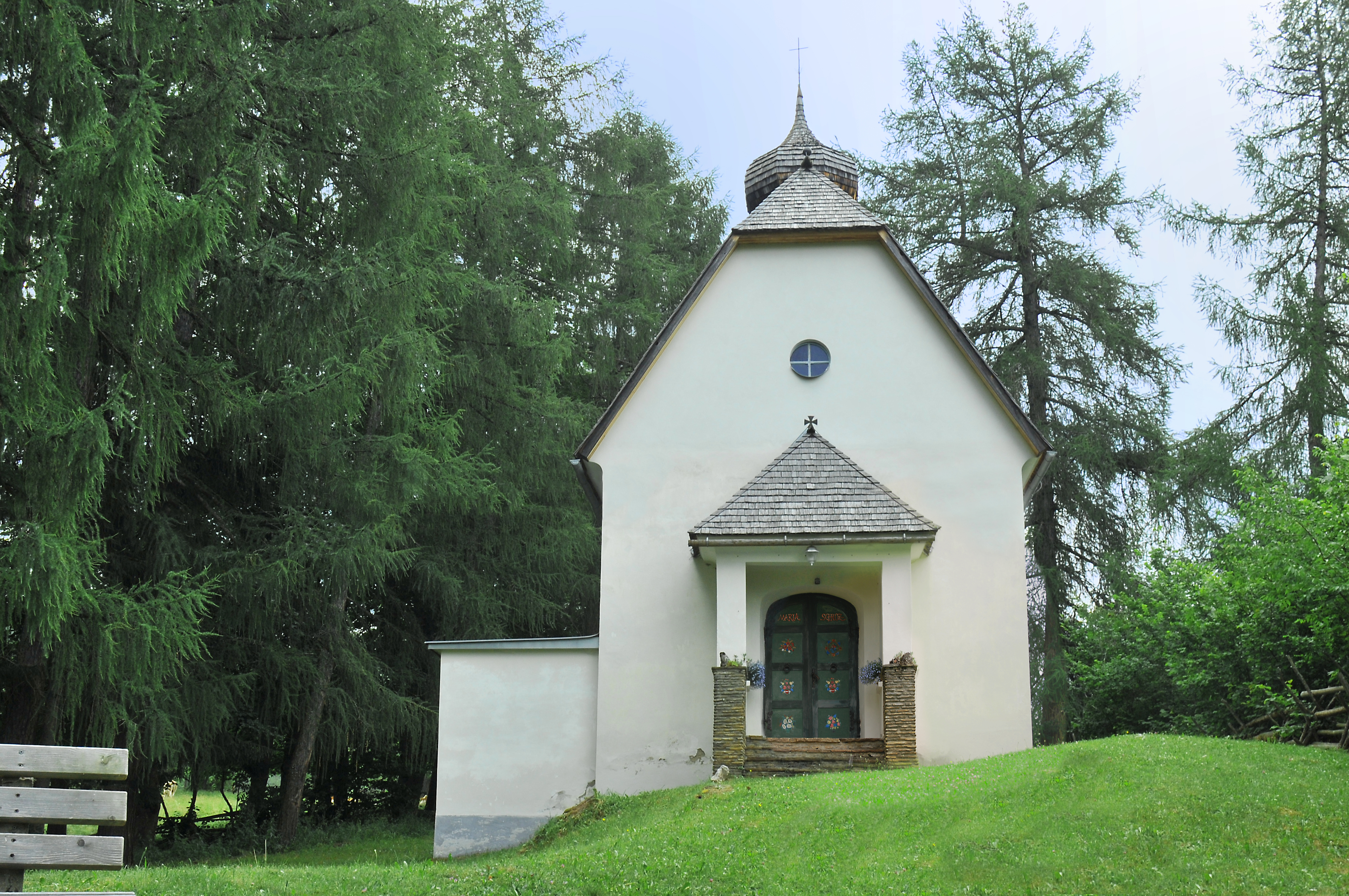 Kath. Filialkirche Maria Schutz, Wallfahrtskirche